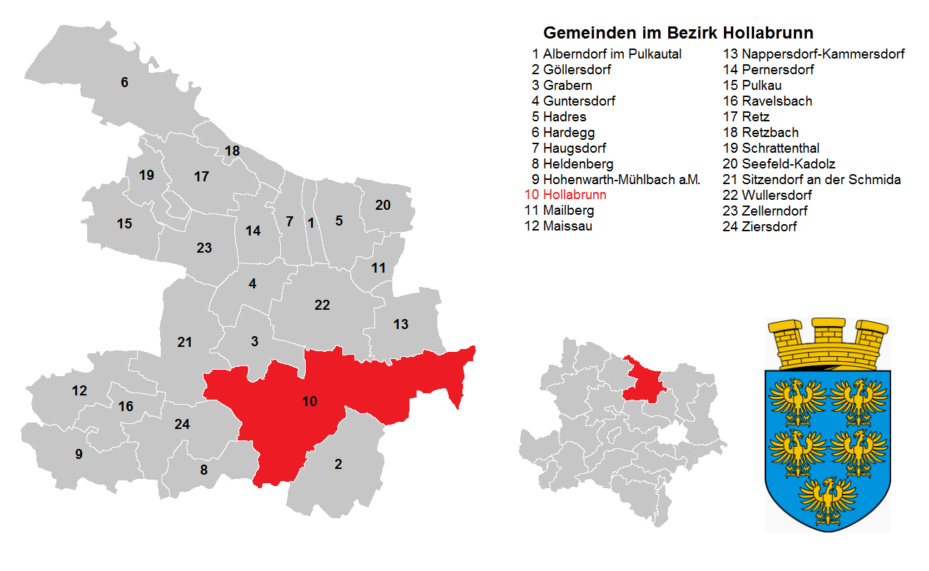 Bezirk Hollabrunn